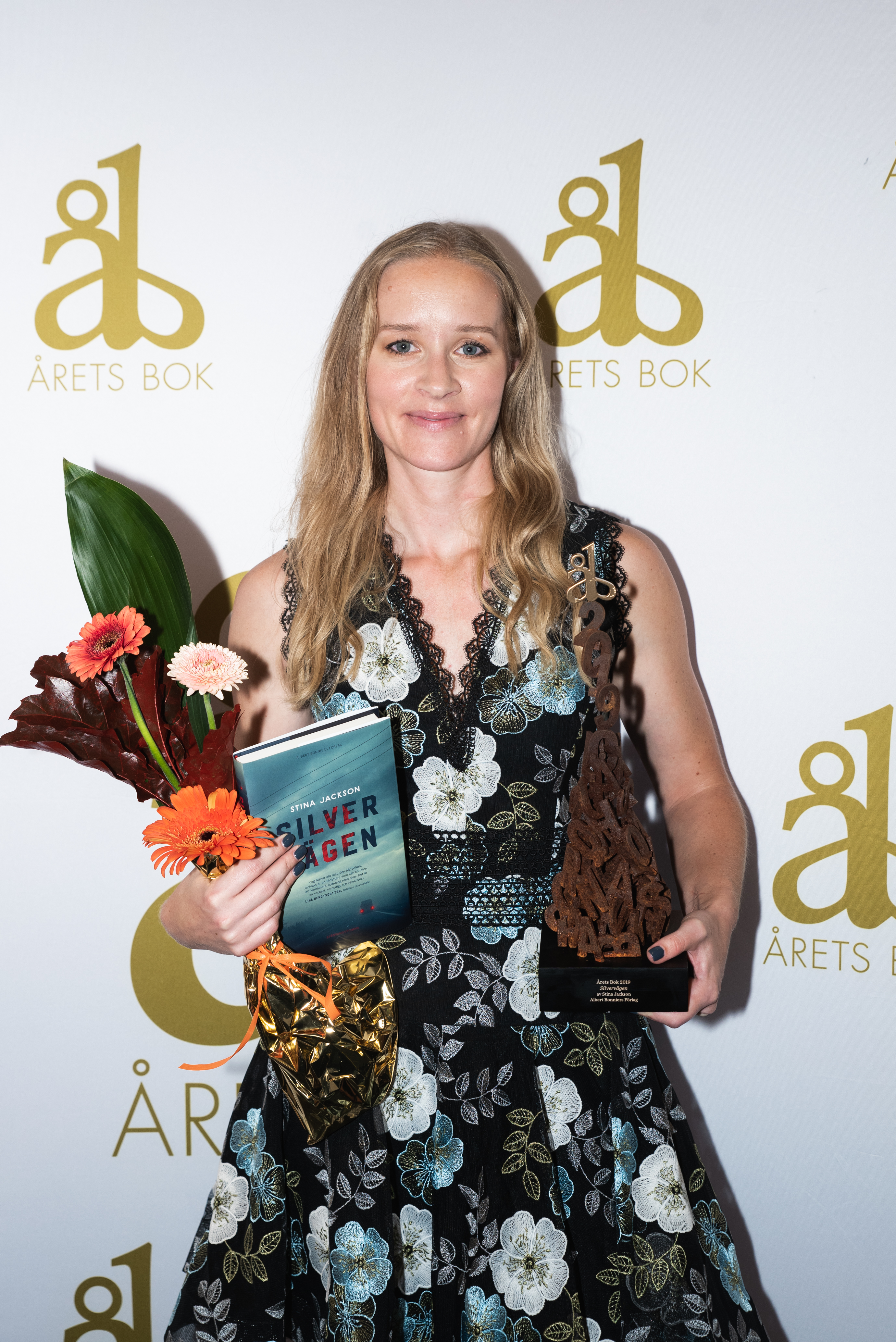 Stina Jackson tog emot priset Årets Bok 2019 för sin bok Silvervägen